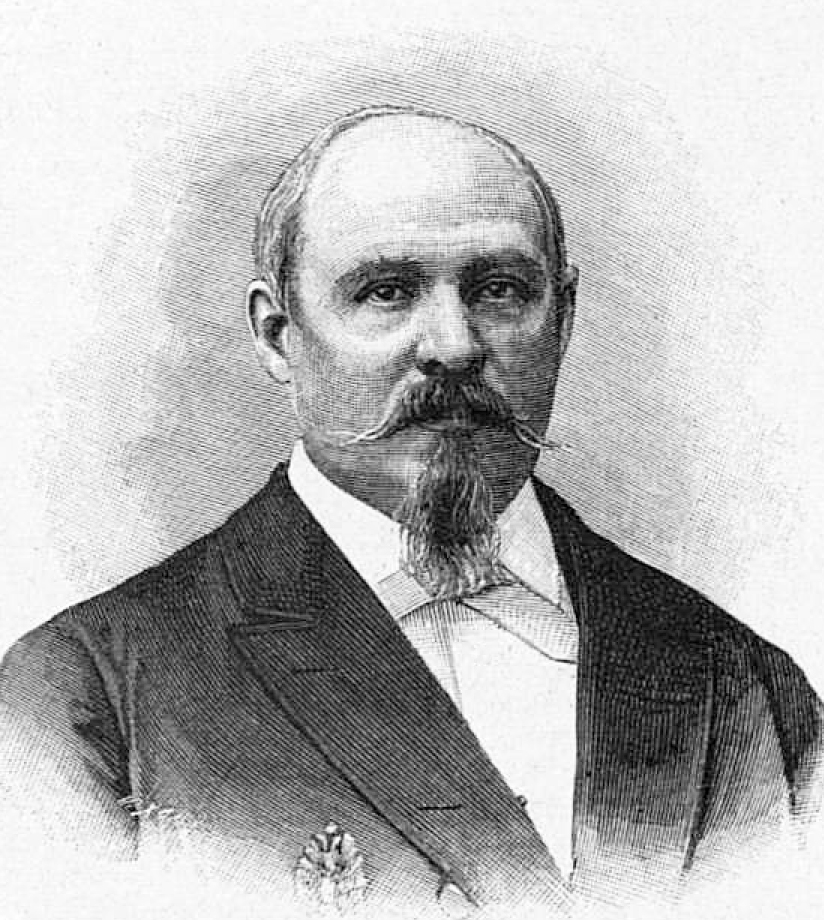 Кенель Василий Александрович (1834-1893)